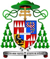 Znak arcibiskupa Františka Vaňáka ver.1